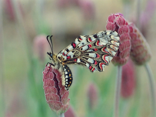 Arlequín (Zerynthia rumina)